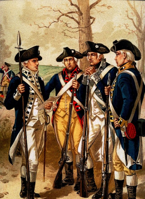 Infanterie der Kontinentalarmee, 1779-1783